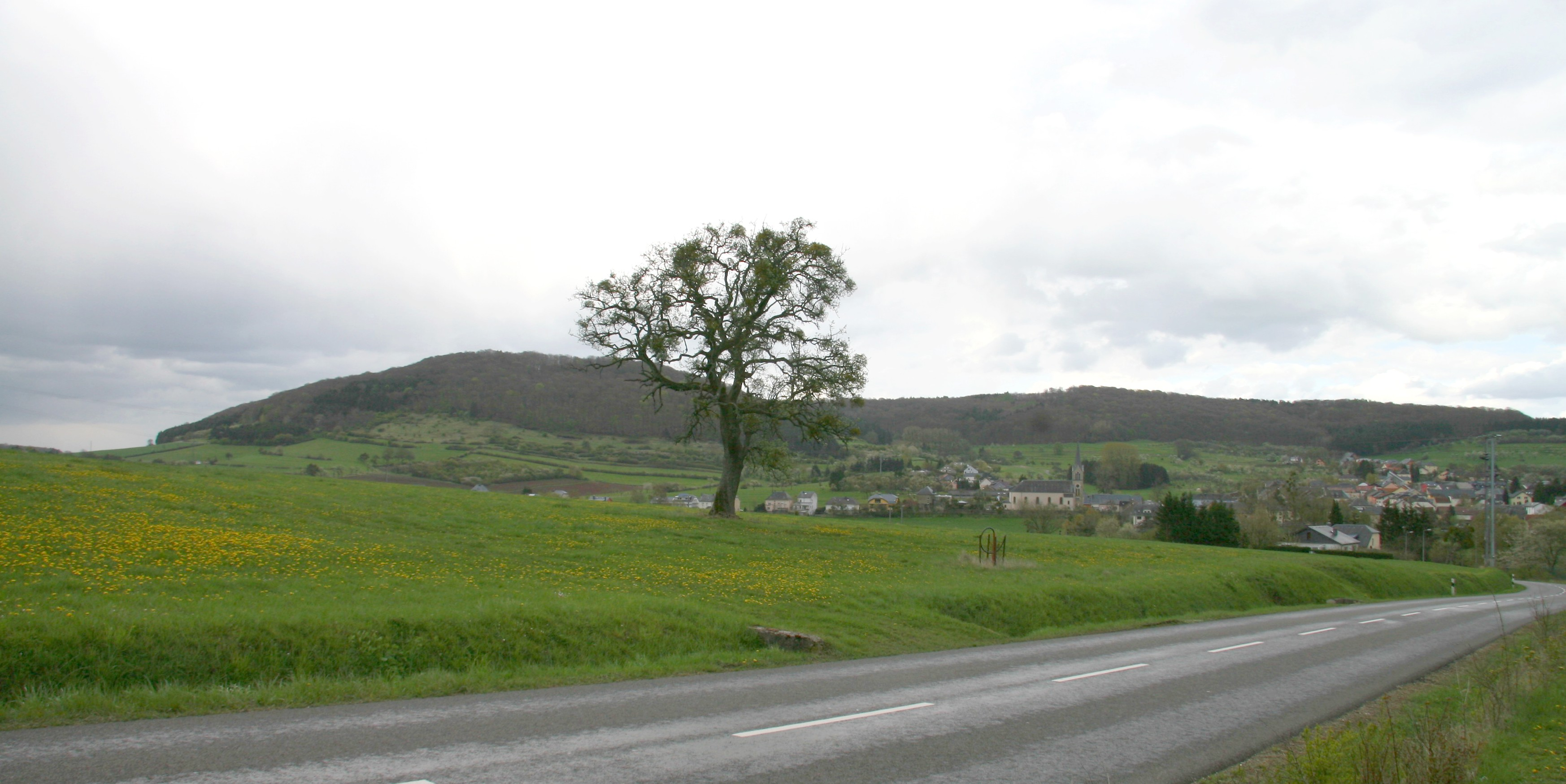 de Widdebierg zu Menster